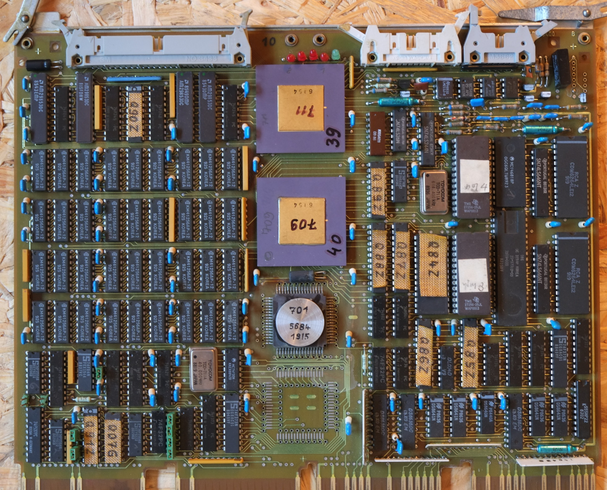 Prozessor-Platine einer K1822. Gerät der Technischen Sammlungen Dresden